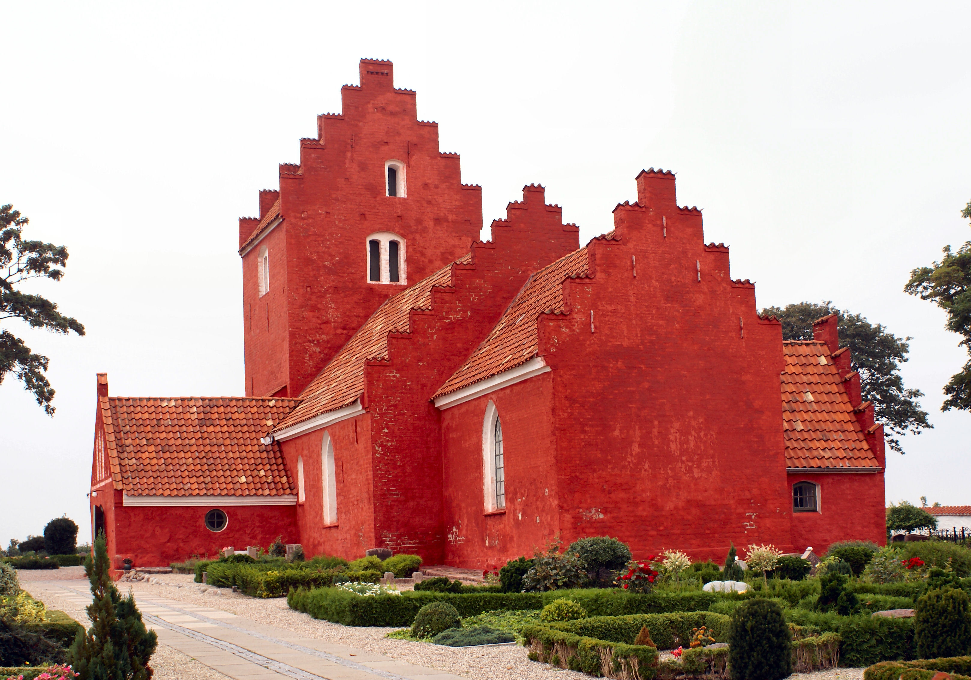 Odden Kirke